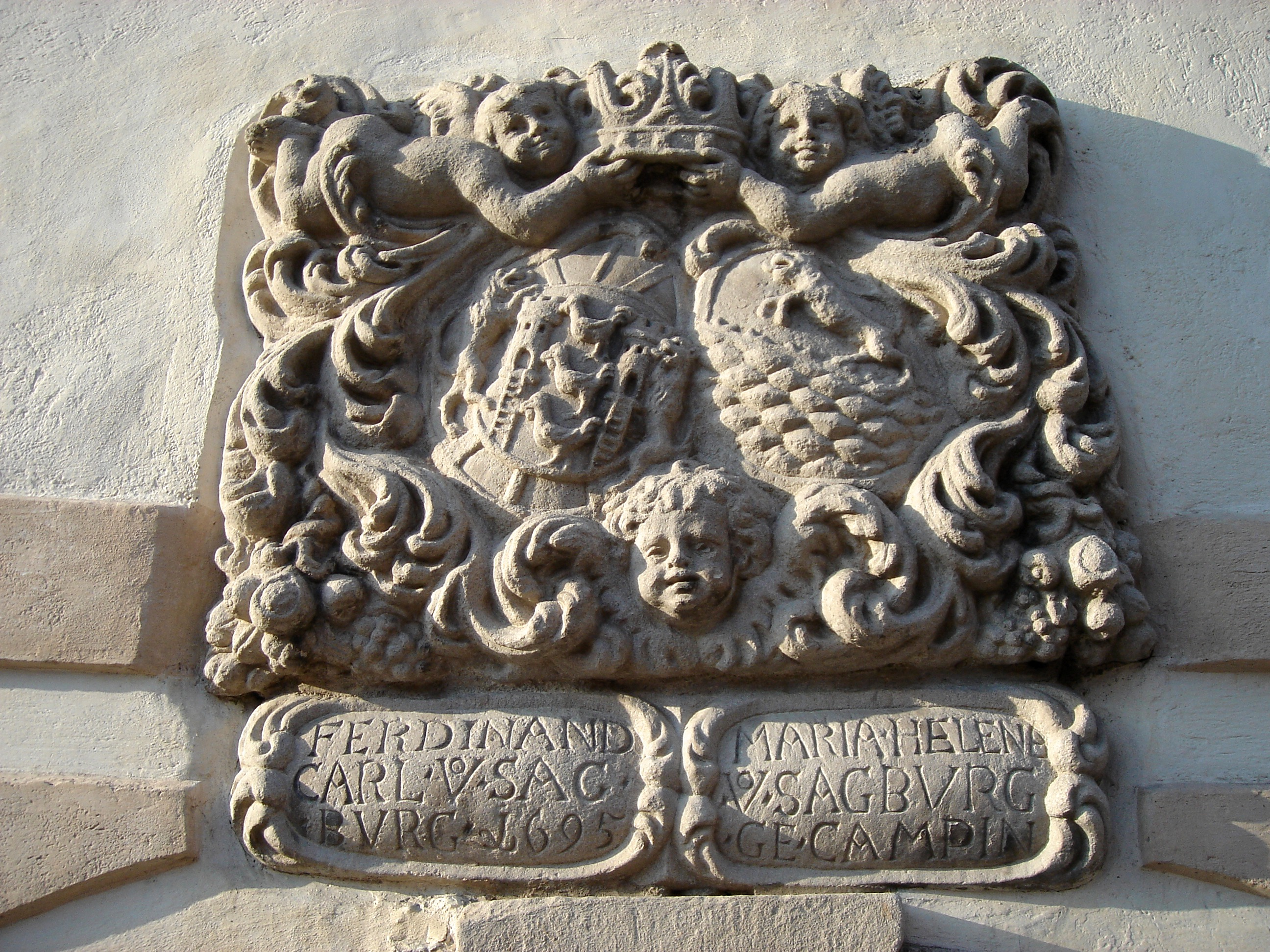 Allianzwappen Sagburg - Campi am Ansitz Rosengarten in Lana/Südtirol, geschaffen von Gregor Schwenzengast